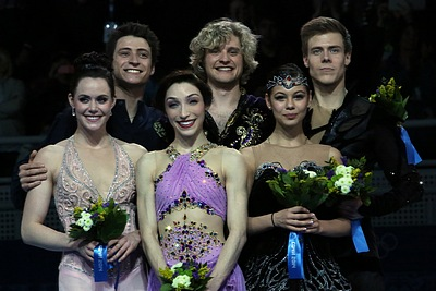 Победители в танцах на льду на Олимпиаде-2014